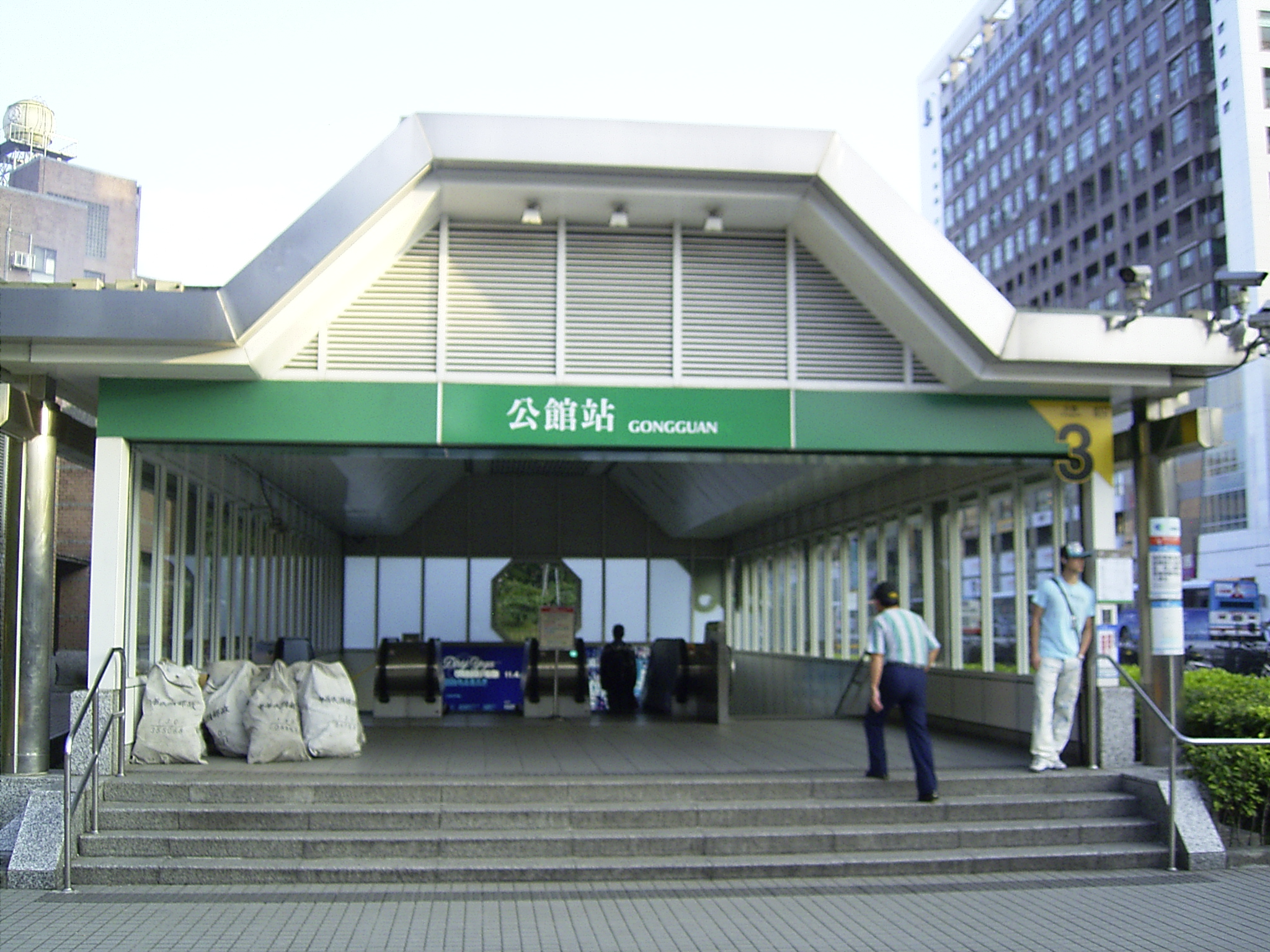 Taipei MRT Gongguan Station, Exit 3